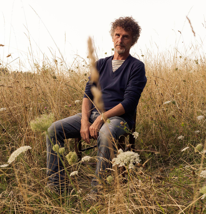 Alberto Terrile, autoritratto (2016) scattato presso Iola di Montese, paese dell'appennino tosco-emiliano.